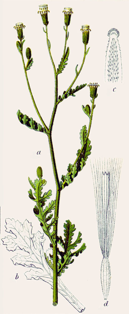 Senecio viscosus